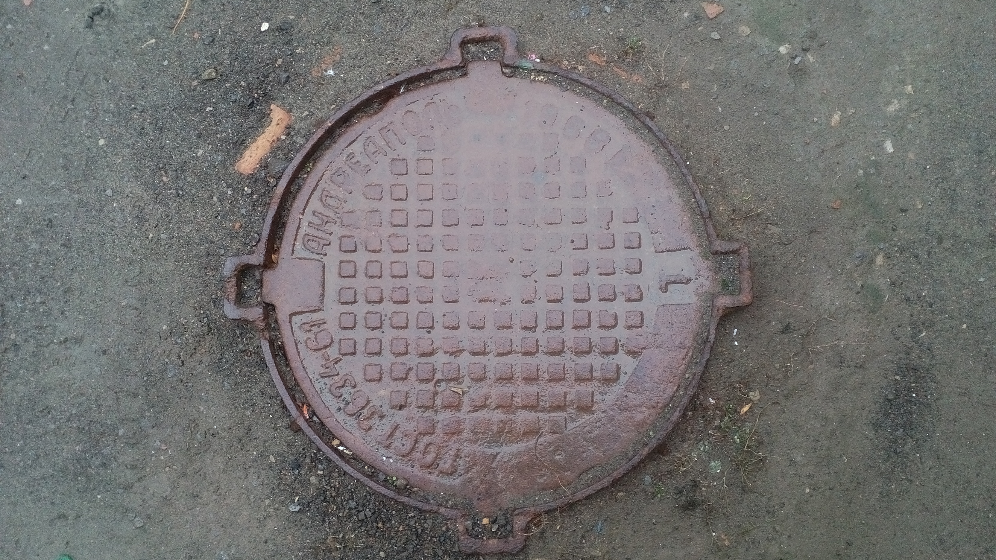 Канализационная крышка, город Каменск-Шахтинский